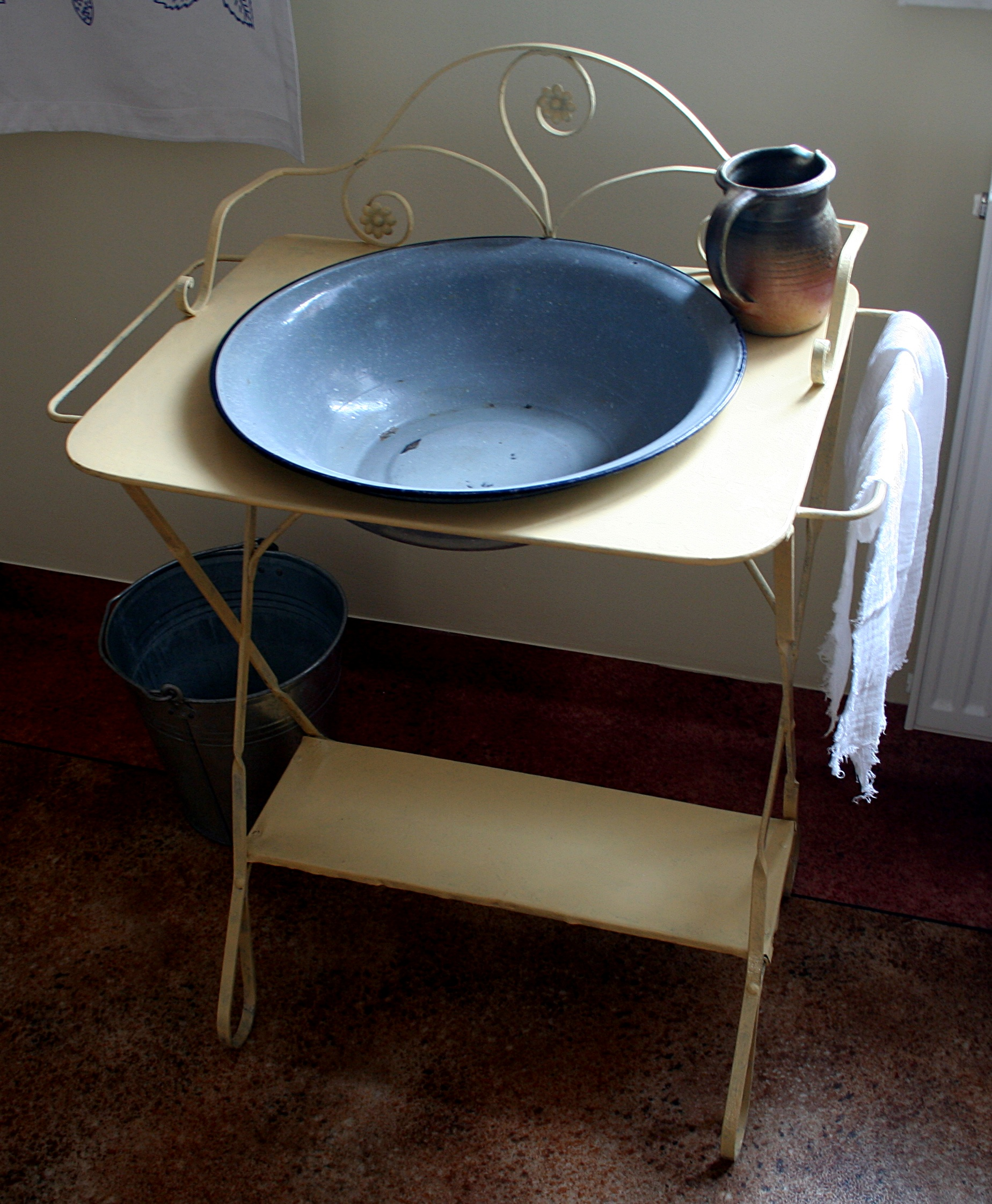 Umywalka, ekspozycja muzealna w GOK w Sierakowicach, woj. pomorskie